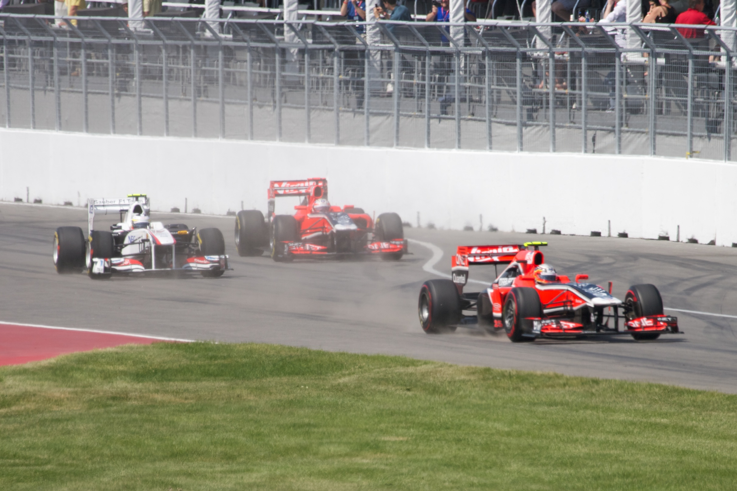 Virgin et Sauber au GP du Canada 2011